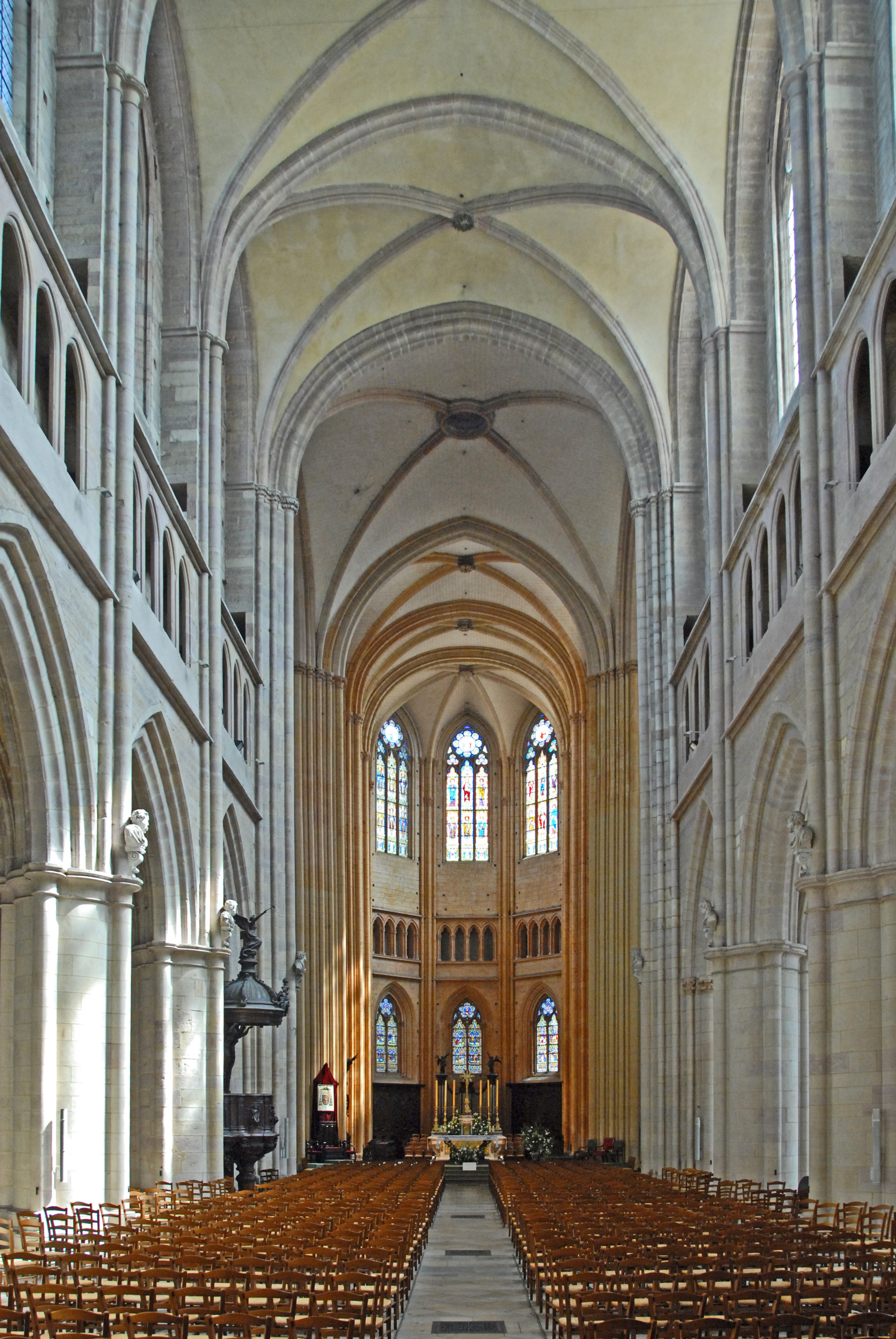 St-Bénigne, Mittelschiff zum Chor